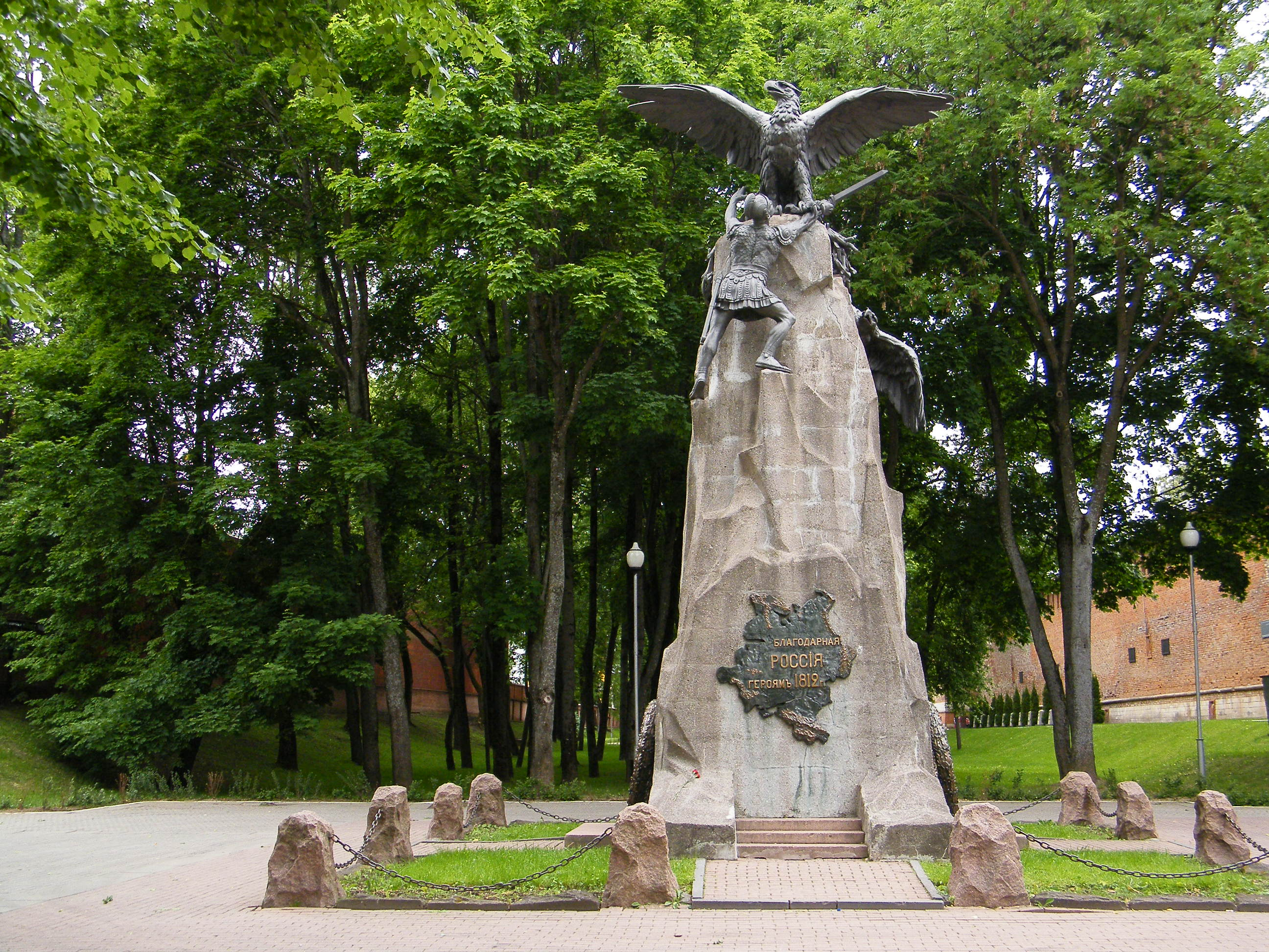 Памятник Благодарная Россия